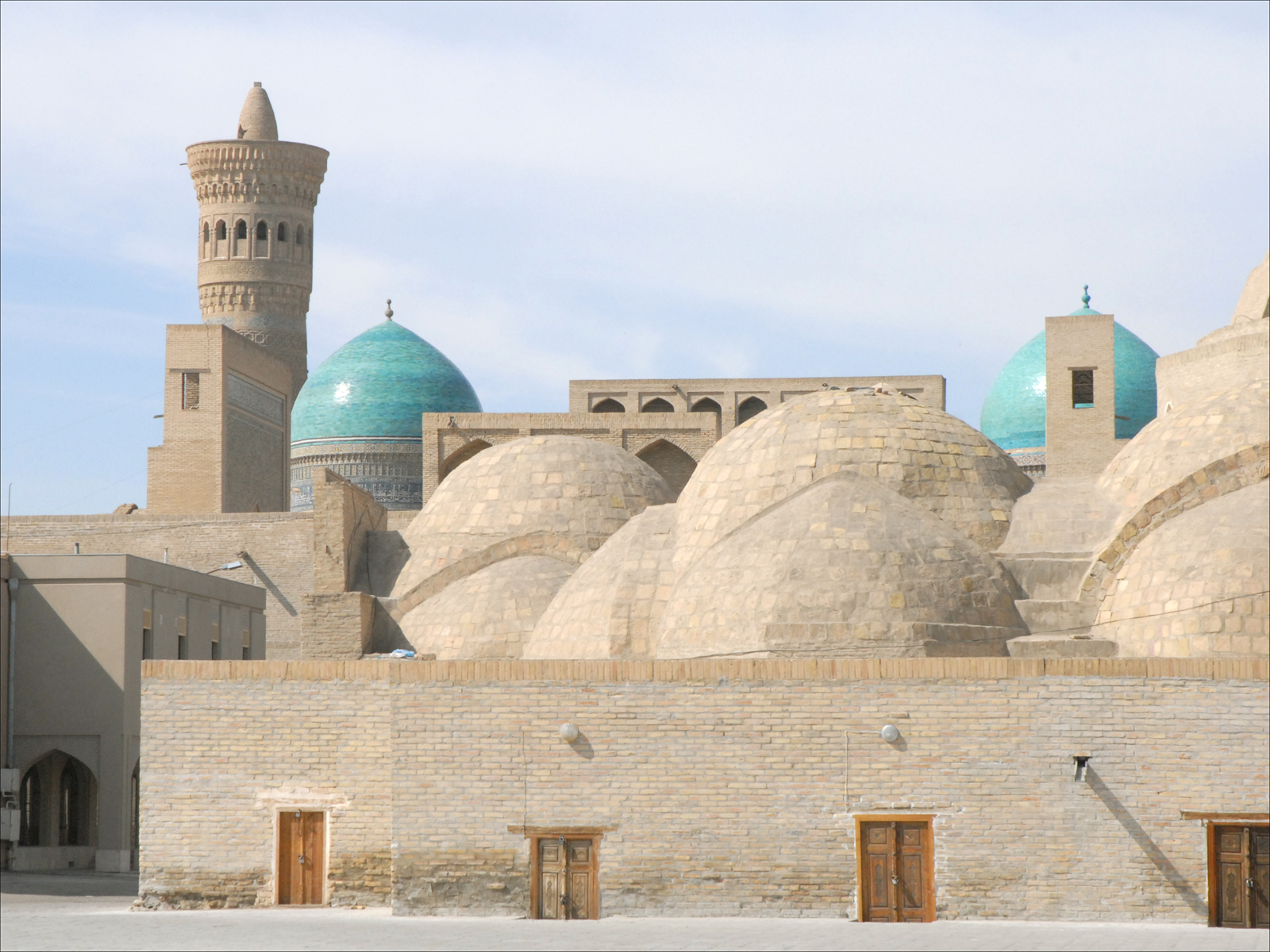 Au moyen-âge, Boukhara était une ville marchande de première importance, une étape majeure sur la route de la soie. Les rues du centre ville étaient des marchés dont chacun avait une spécialité. Les marchés étaient des constructions aux coupoles multiples appelées "Tok" (arche ou voûte). Sur la photo, le bazar des joailliers. Au fond, la partie supérieure du minaret Kalon et les deux coupoles bleues de la médersa Mir-i-Arab.